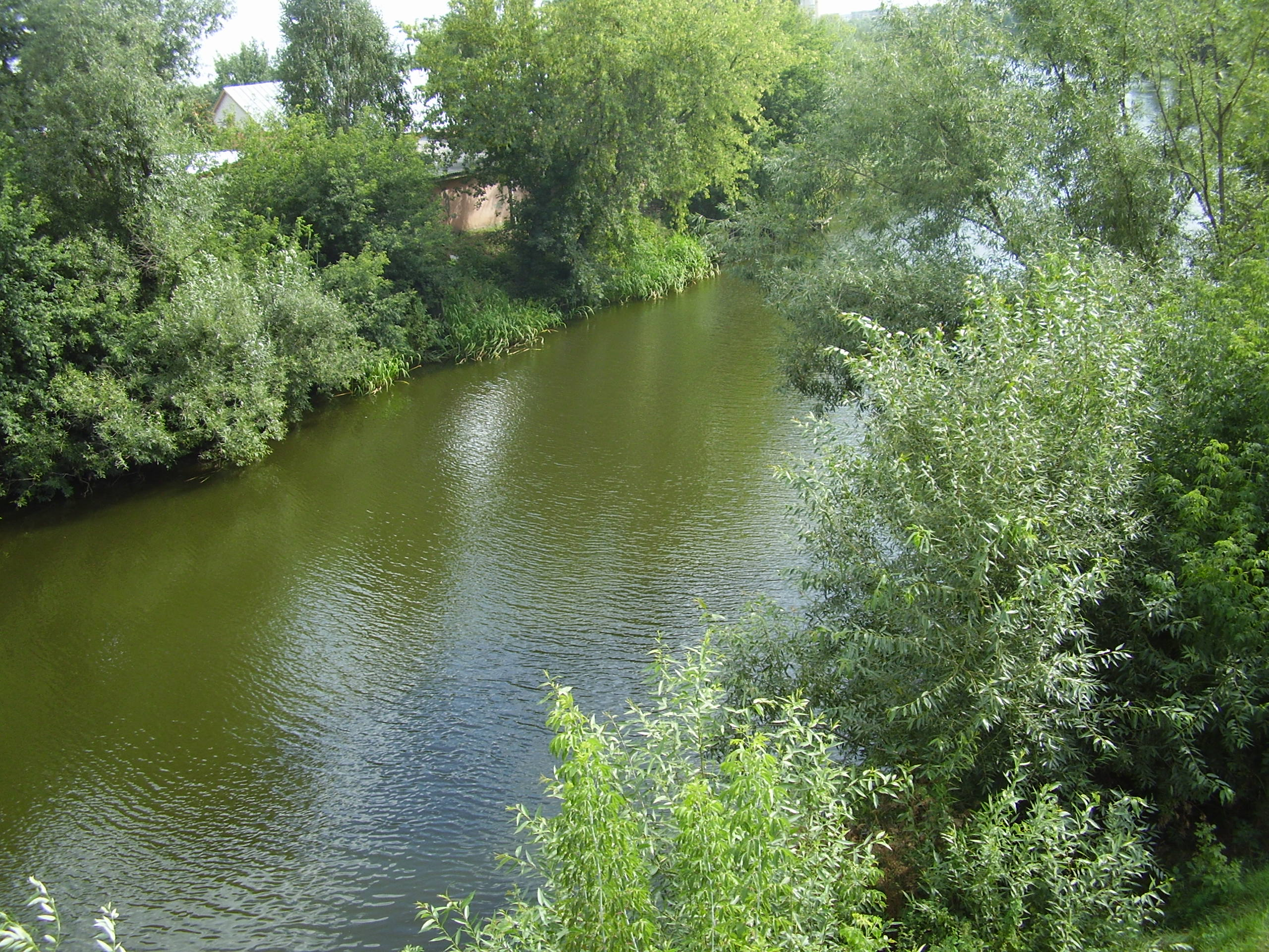 Тамбов,река Цна в парке